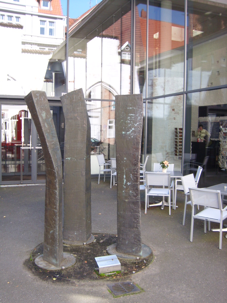 Skulptur Drei Stehende von Jan Koblasa (*1932) in Tábor in der Tschechoslowakei, heute auf Ibiza lebend.